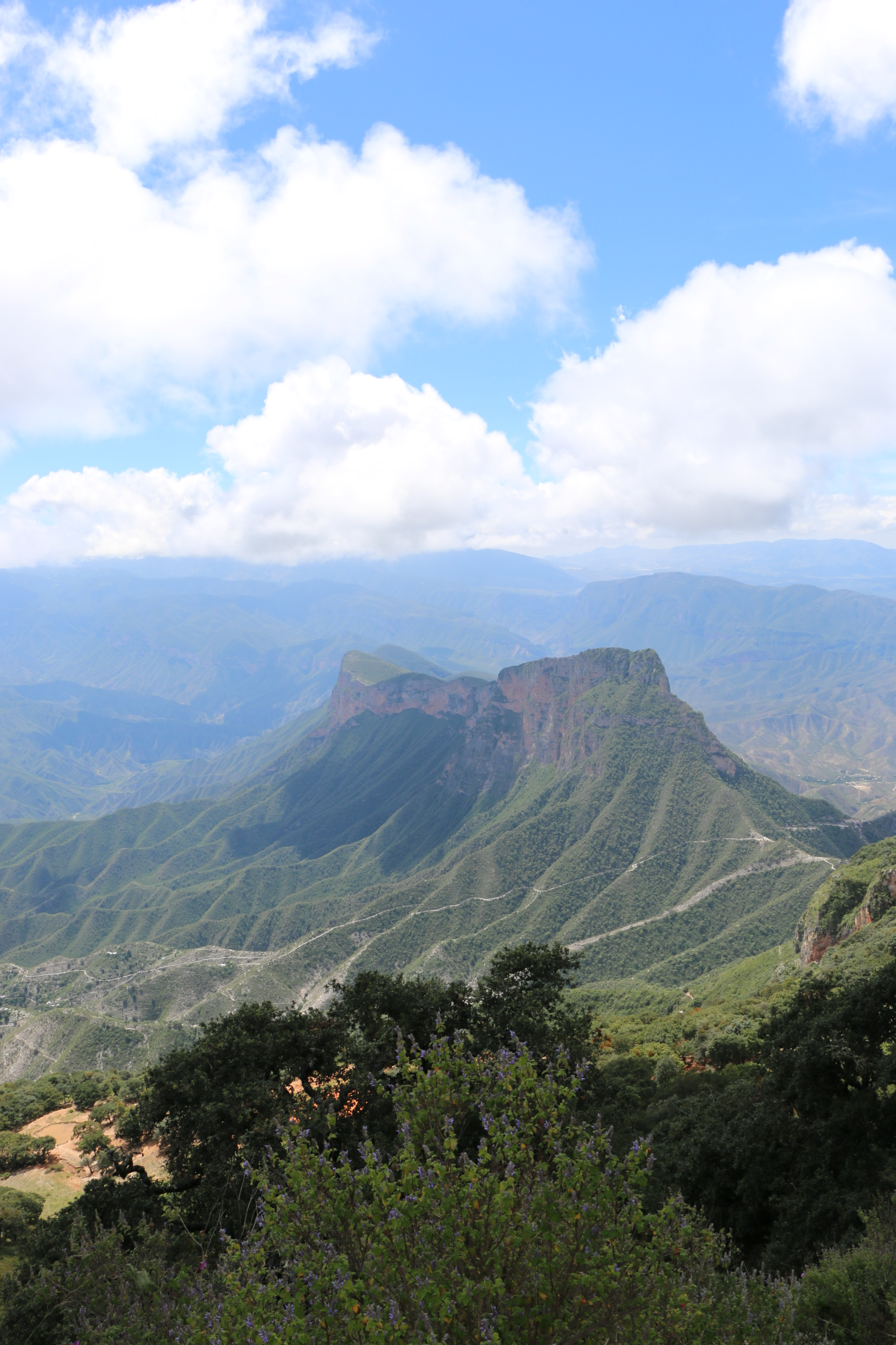 Sierra Gorda vista desde el Mirador de Cuatro Palos